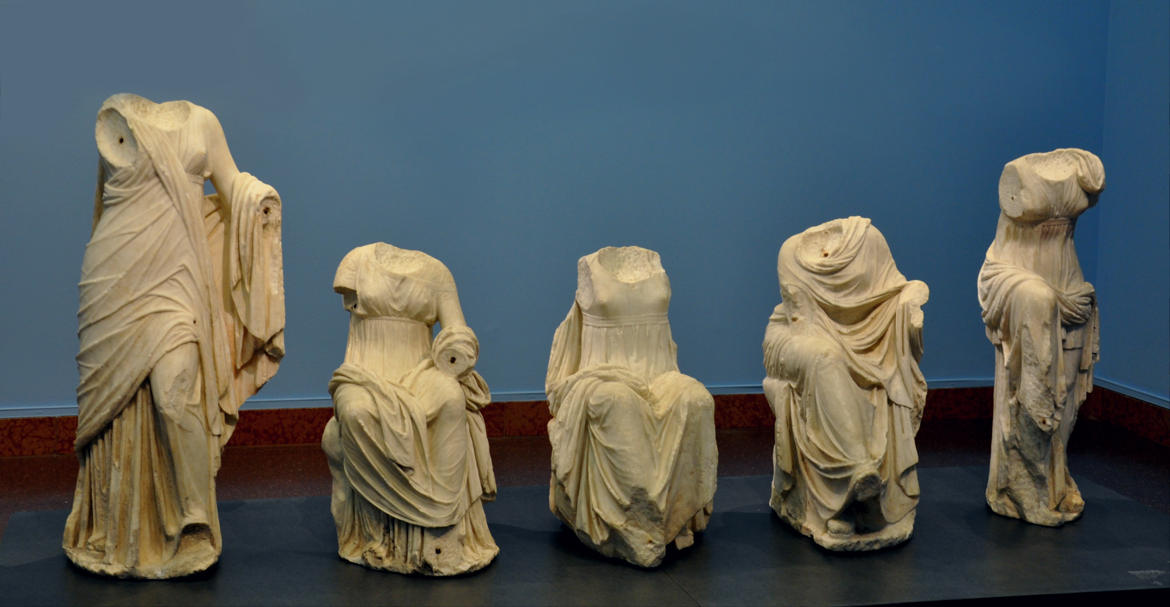 Musengruppe von Agnano, Griechenland, um 120/100 v. Chr.; Marmor; Liebieghaus, Frankfurt am Main, Inv. Nr. 159–163; zunächst wohl in Delos, dann in der röm. Thermenanlage von Agnano bei Neapel